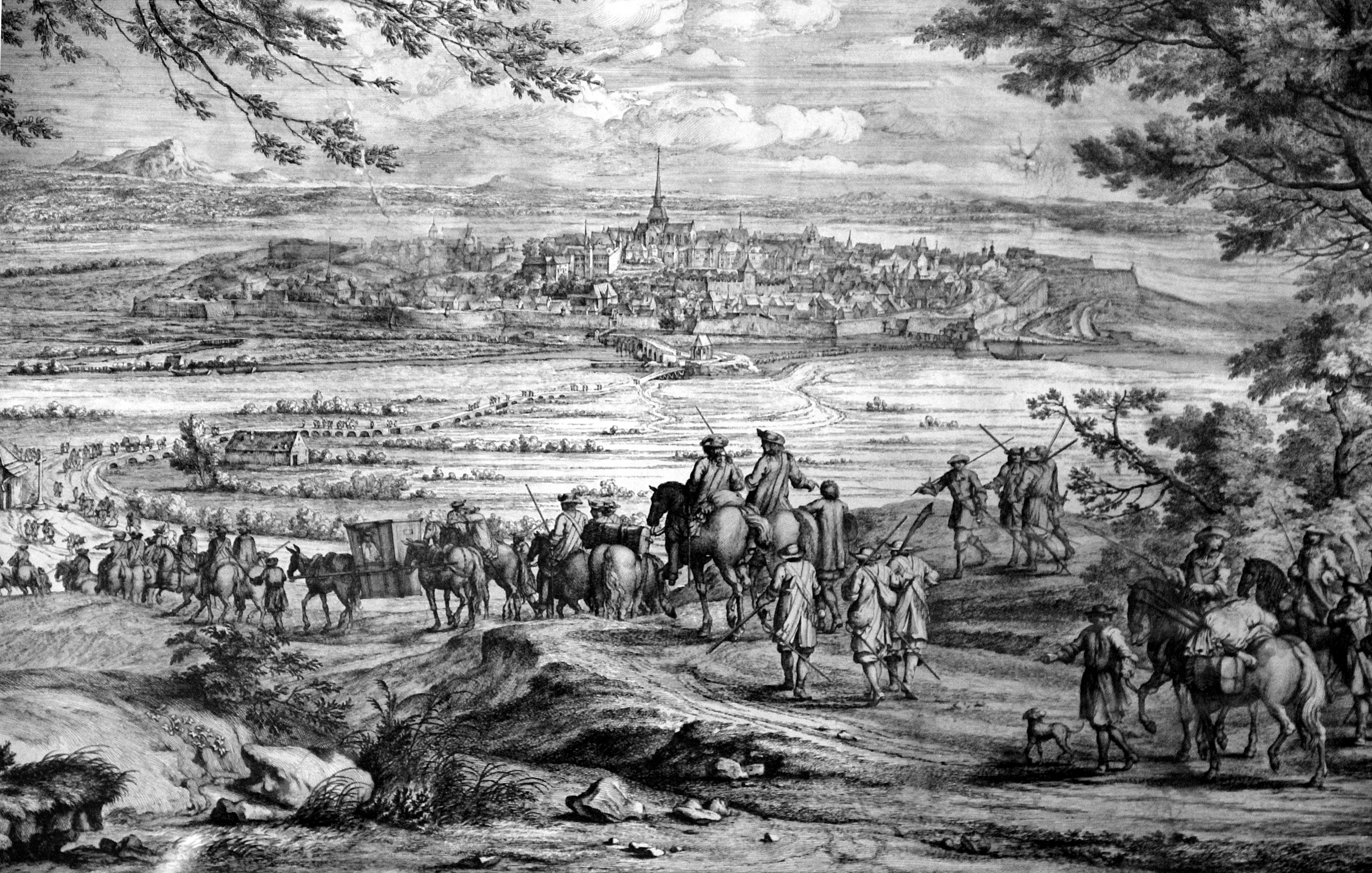 Gravure «Veuë de la ville de Gray en Franche-Comté » réalisée en 1685 d’après Adam François van der Meulen appartenant aux collections du château de Vaux-le-Vicomte - Maincy (Seine-et-Marne, France).